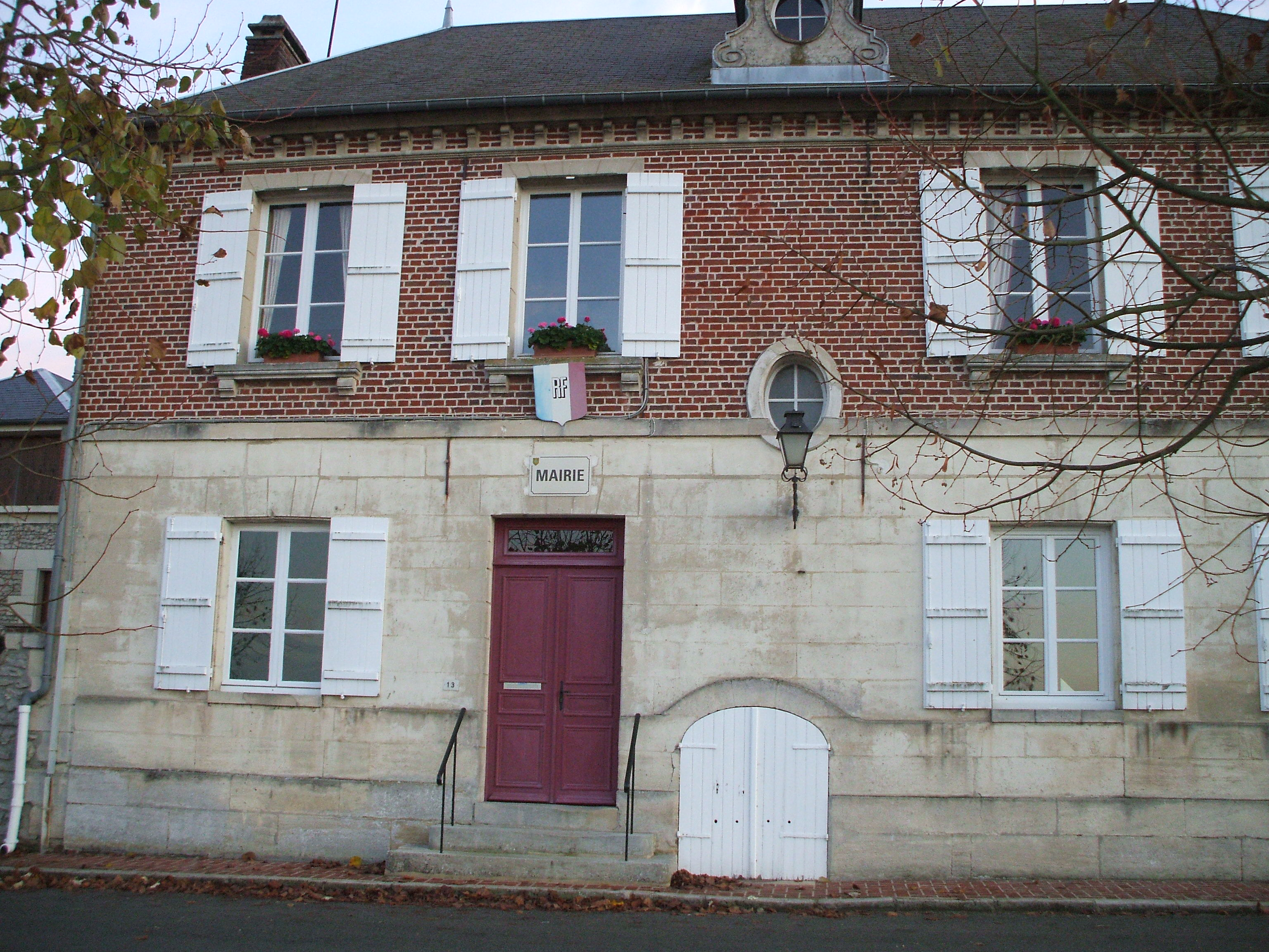 mairie de Silly-Tillard oise france